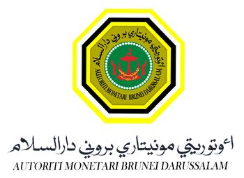 Autoriti Monetari Brunei Darussalam